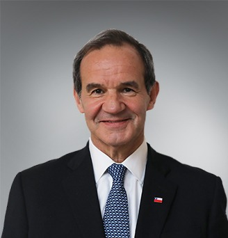 Foto oficial de Andrés Allamand como Ministro de Relaciones Exteriores en 2020